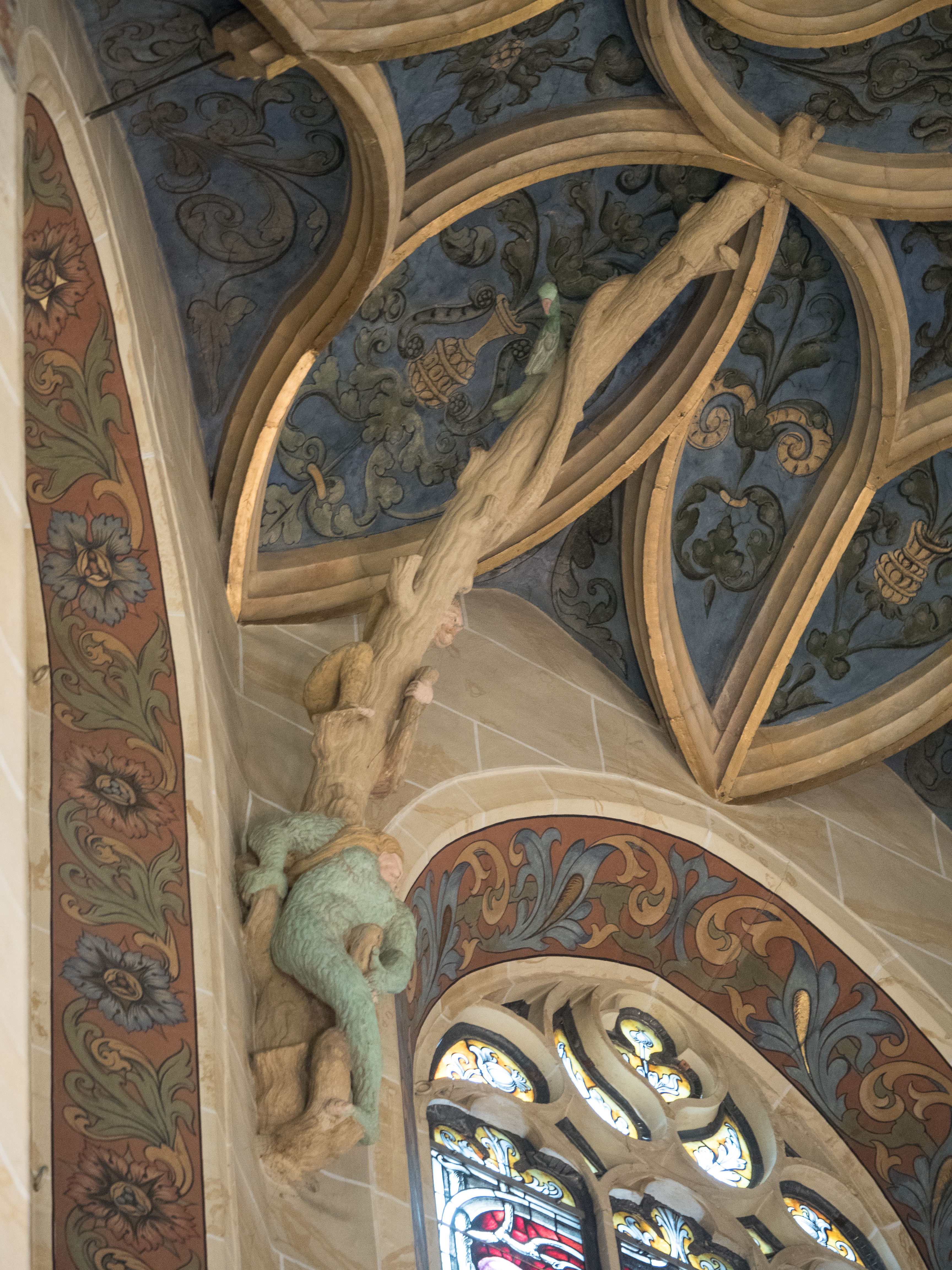 Gewölbe der Marienkriche von Pirna